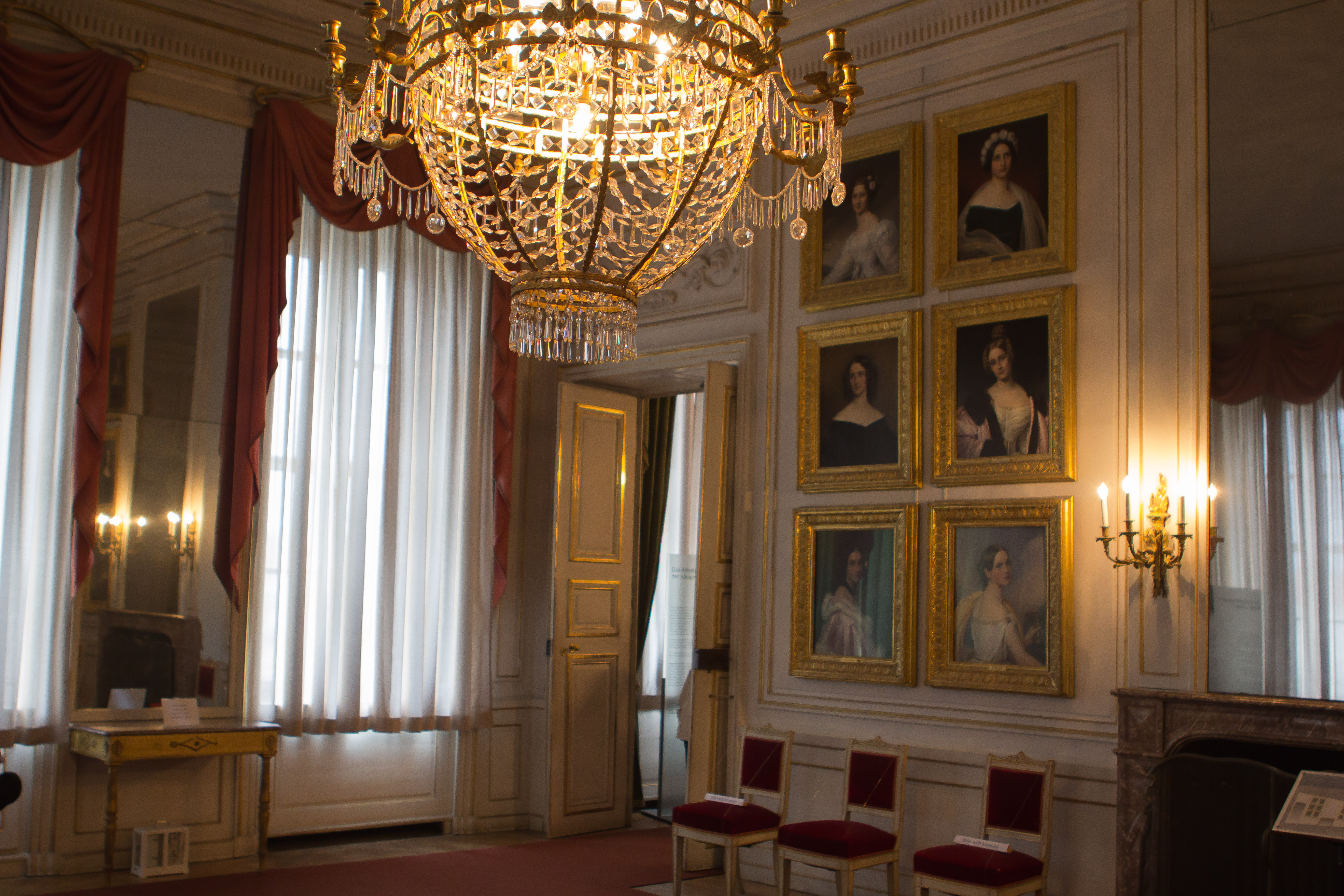 Intérieur du château de Nymphenburg à Munich (Munich, Bavière, Allemagne)